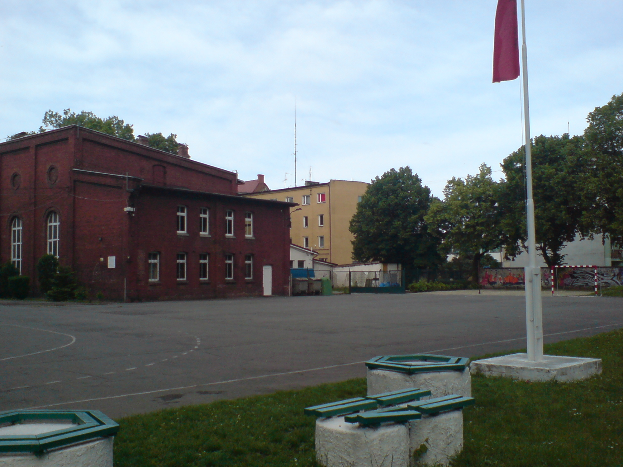 Boisko Zespołu Szkół Budowlanych w Raciborzu